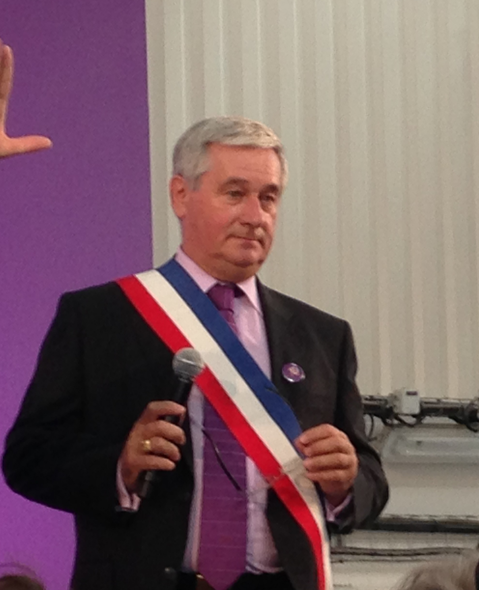 Le maire de Pierrefitte Michel Fourcade à la tribune de l'inauguration du tramway T5 le 31 août 2013 au centre de remisage de Pierrefitte-sur-Seine (93).